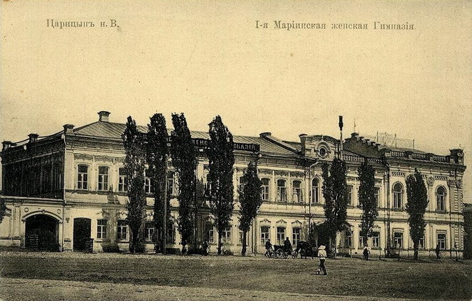 Мариинская женская гимназия в Царицыне